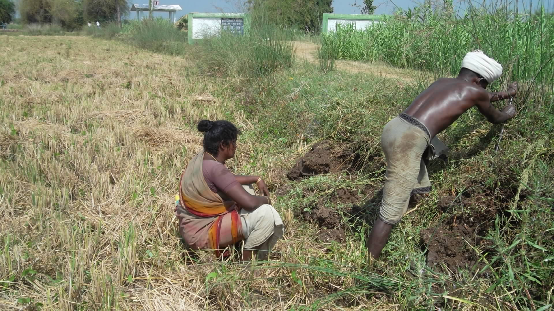 எலி பிடிக்கும் இருளர் சமூகத்தினர் படம் 2